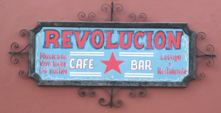 Werbeschild der Bar "Revolucion" in San Cristóbal de las Casas